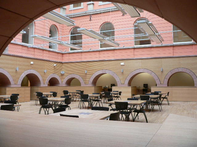 vue sur le centre de documentation et d'information du lycée de Bouxwiller (67) France.